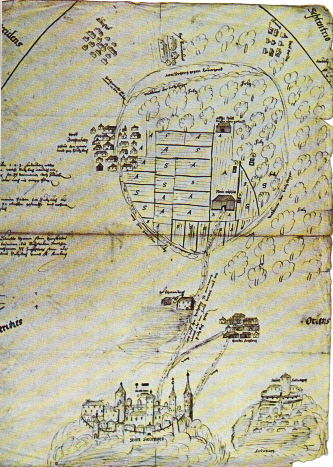 Der Falzberg bei Sulzbach mit Berggebäuden und Vignetten der Stadt Sulzbach und der Burg Rosenberg